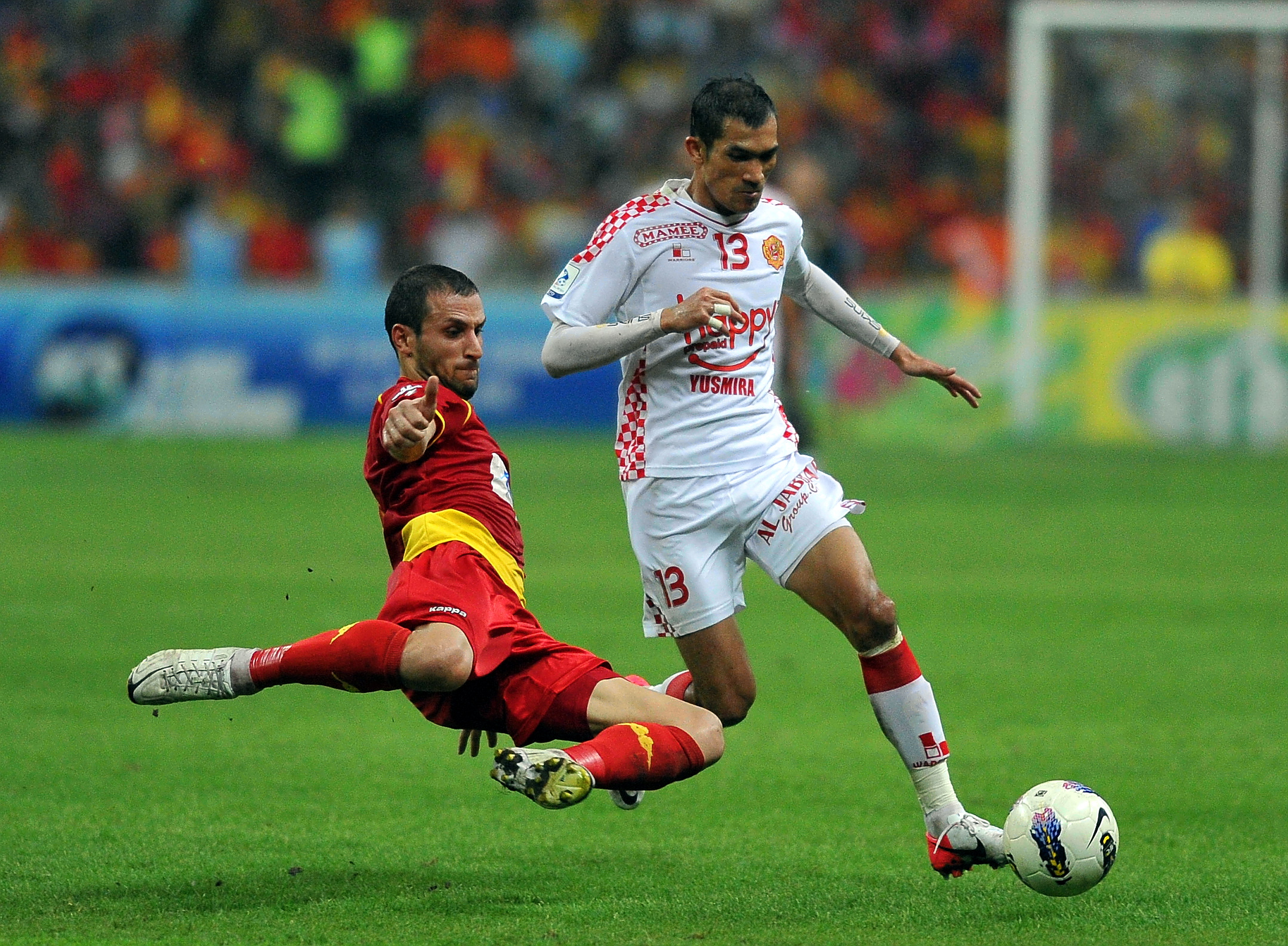 Shah Alam, 13/10/2012 Selangor's Ramez Dayoub (left) and Kelantan’s Indra Putra Mahayuddin fight for the ball during Malaysia Cup Semi-final 2012 at Stadium Shah Alam. Pix Firdaus Latif